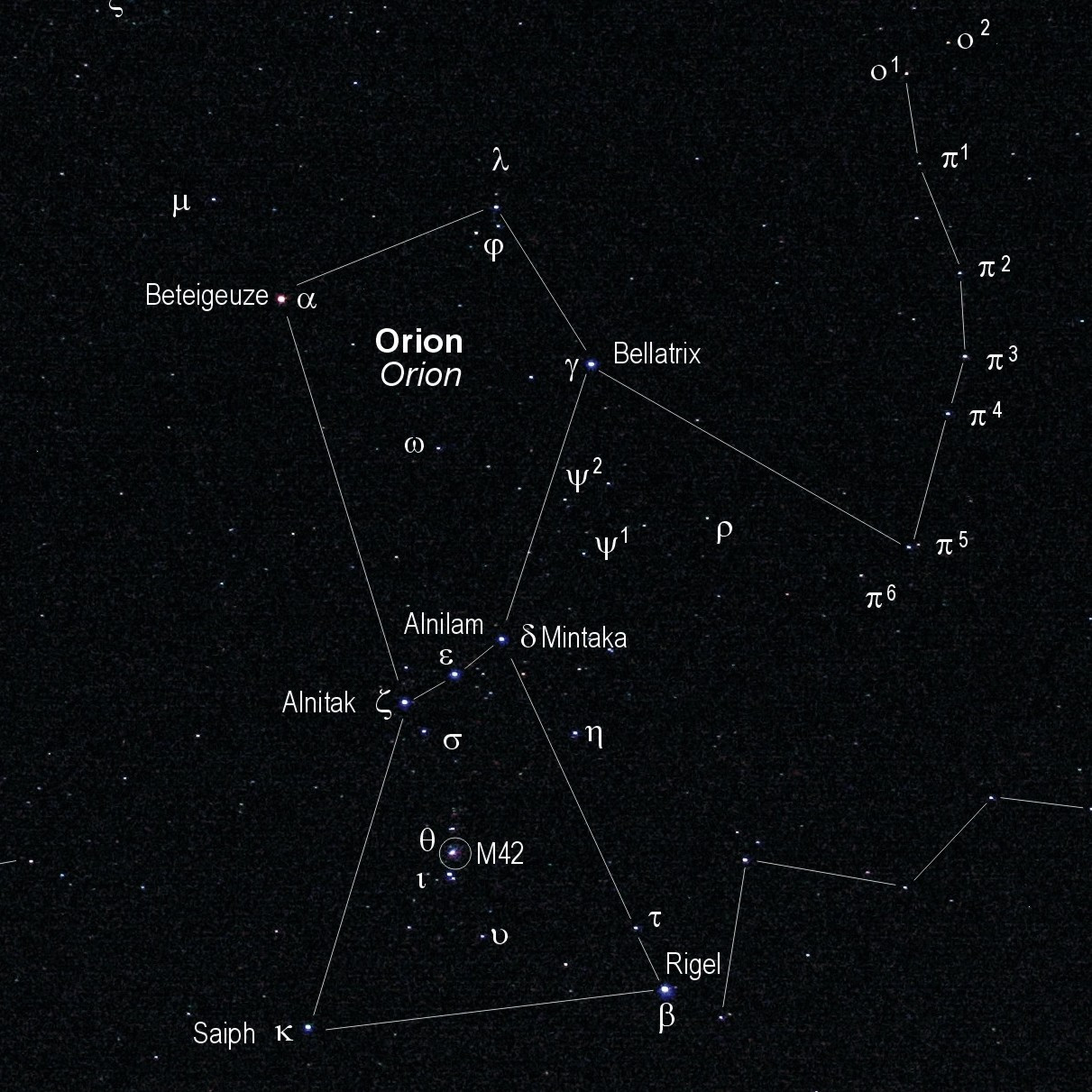 Sternbild Orion, fotografiert mit 35mm Weitwinkel, 15 Sekunden, Blende 2,0, Canon G5